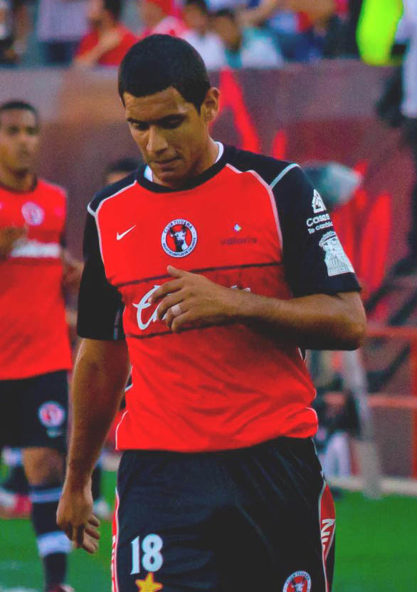 xolos debuto en el maximo circuito del futbol mexicano con una derrota ante el campeon monarcas morelia, un gran lleno en el estadio Caliente fue testigo del debut de los xoloitzcuintles en la primera division